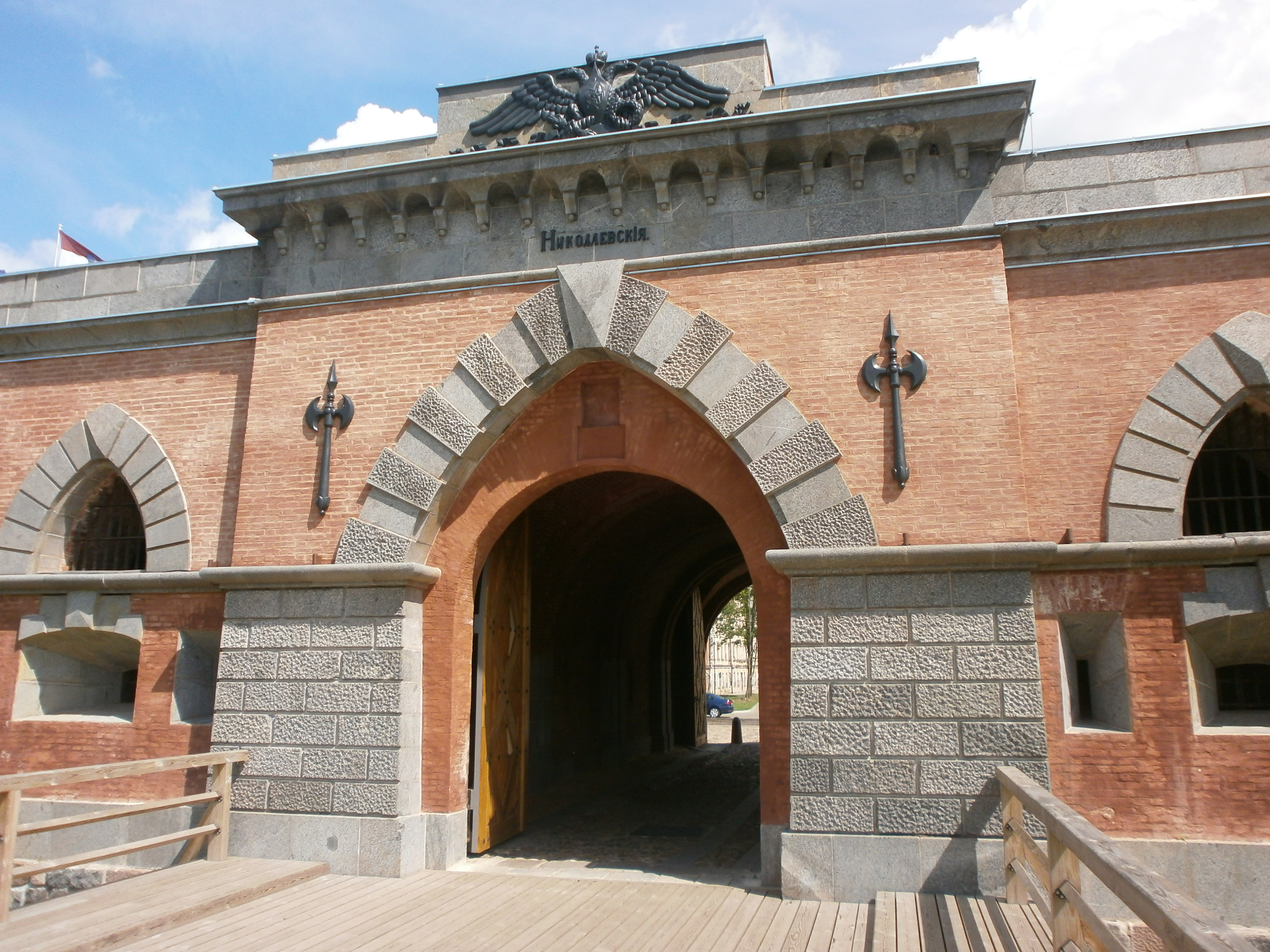 Nikolaja vārti, Daugavpils